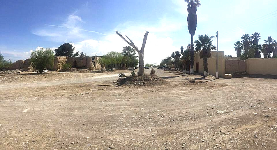 Describe las condiciones en las que se encuentra el ejido donde está ubicada la Hacienda Santa María del Rosario